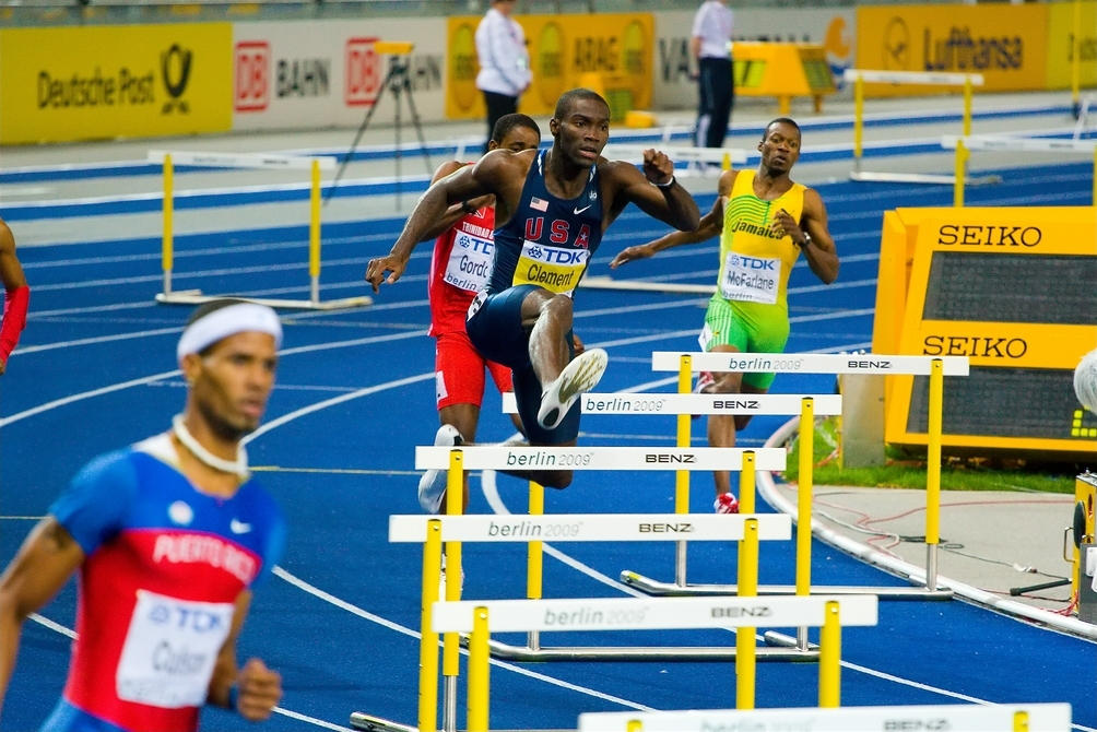 Kerron Clement - beim Finallauf